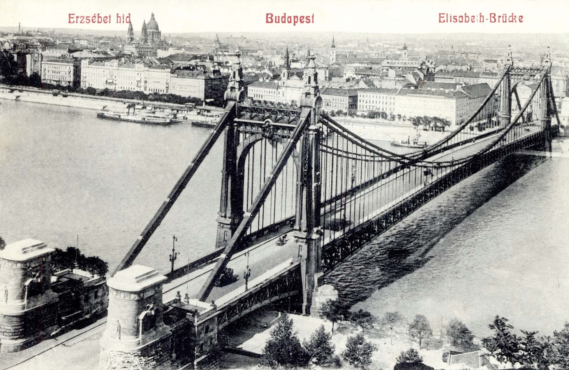 Régi Erzsébet-híd képeslapon, Budapest